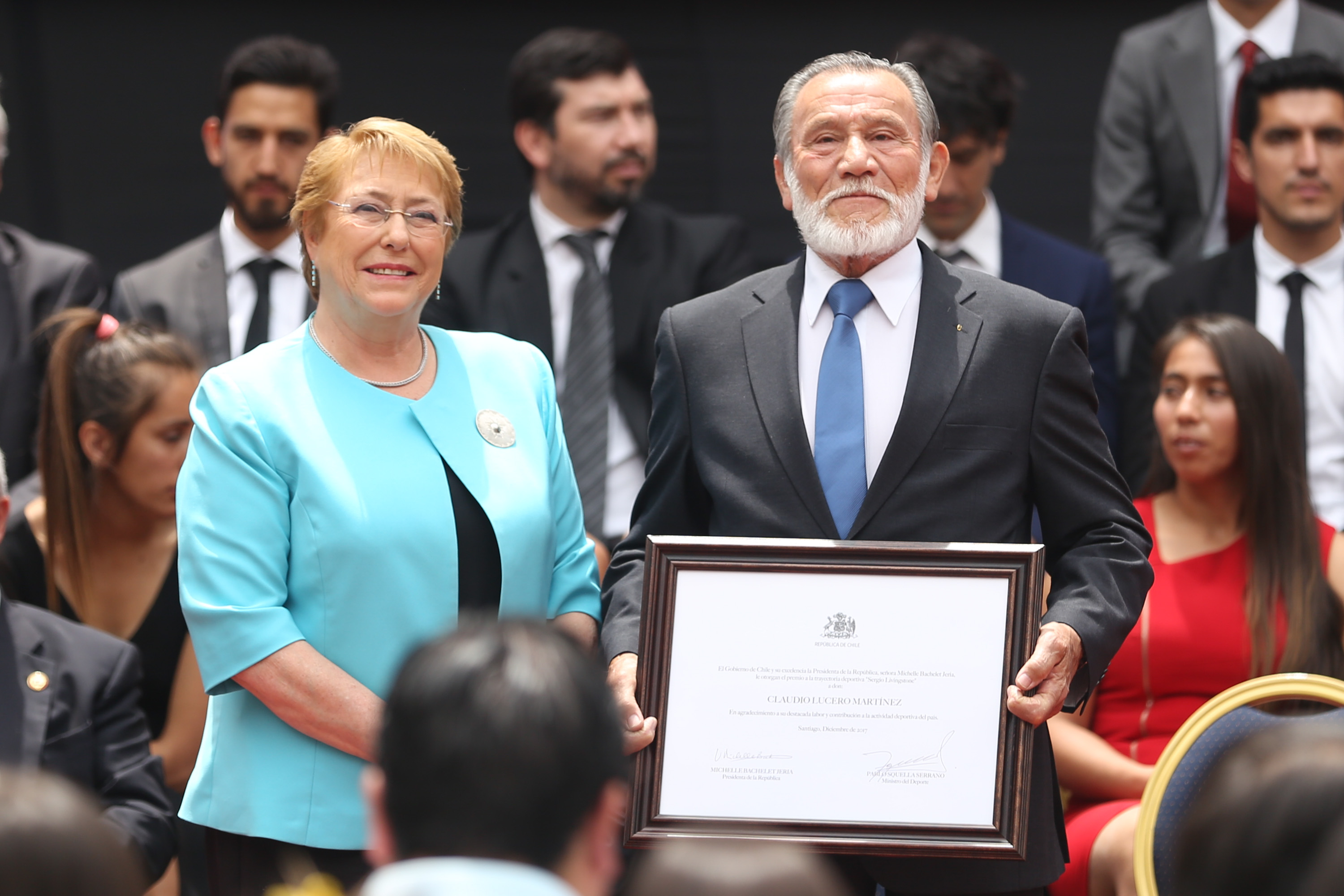 La Presidenta Michelle Bachelet encabeza la ceremonia de Los Premios del Deporte 2017 en La Moneda. Deportistas, técnicos y federaciones presentes. Felicitaciones a tod@s!. En la fotografía: Michelle Bachelet junto a Claudio Lucero Martínez. Lucero (Iquique, 19 de mayo de 1933)​ es un profesor de educación física, montañista, escalador, rescatista y entrenador de montañismo chileno.